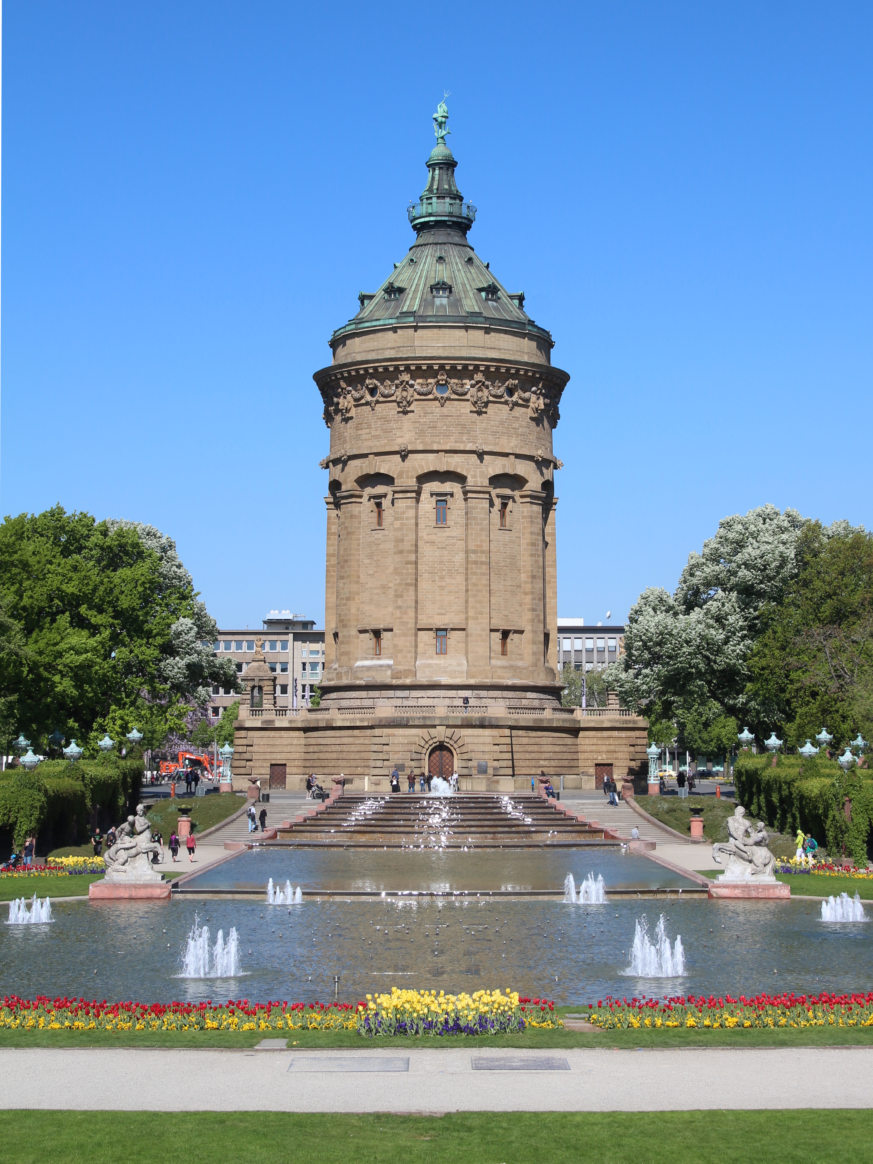 Siehe Bild und Dateiname